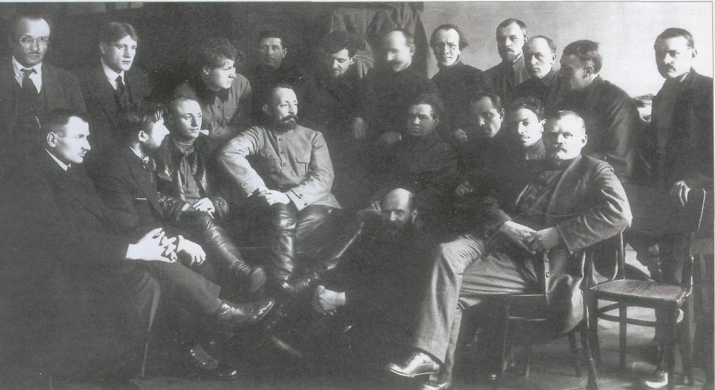 Ф. Э. Дзержинский среди сотрудников ВЧК. Фотография 1918 года